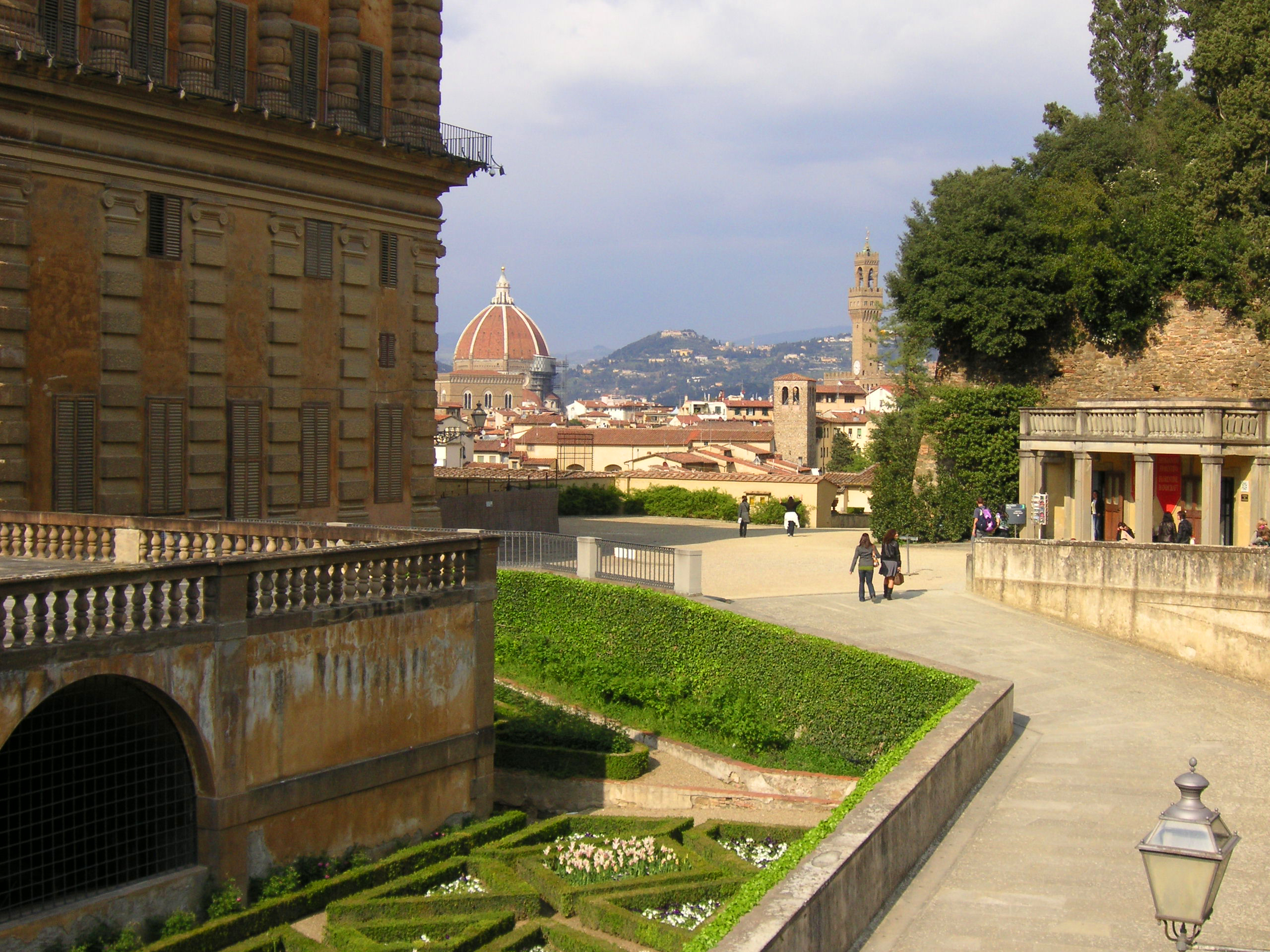 Palazzo Pitti in Florence, Italy 1870s. 2007.